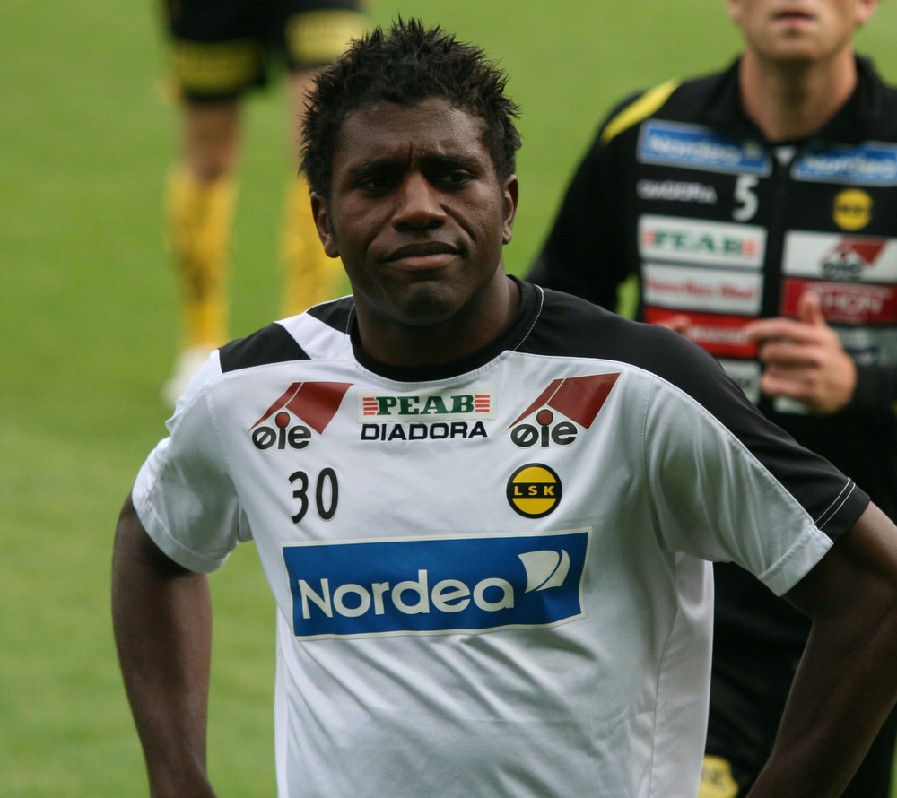 Olivier Occean, på Viking stadion 24. august 2008